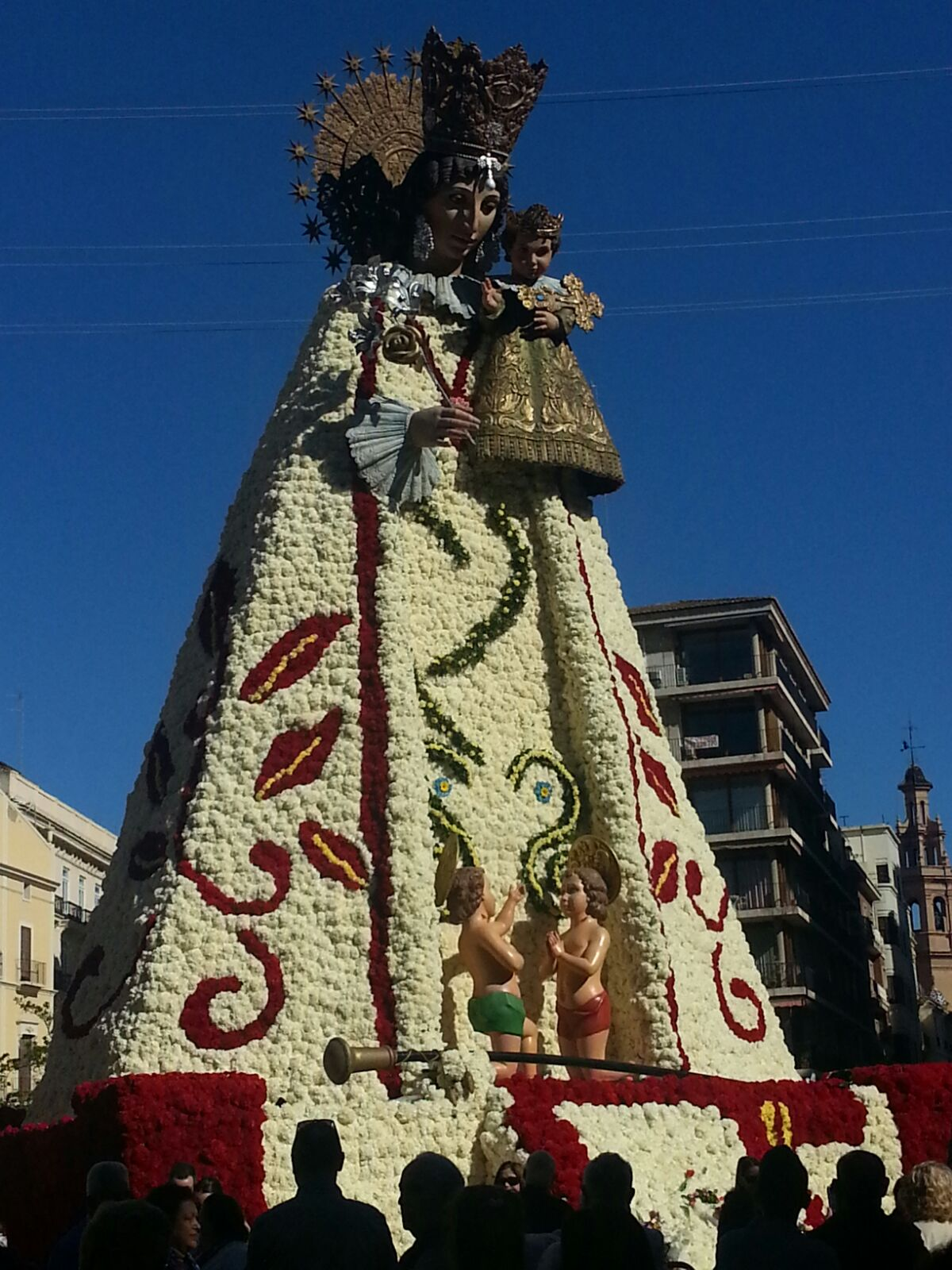 Virgen de los Desamparados, ofrenda 2016